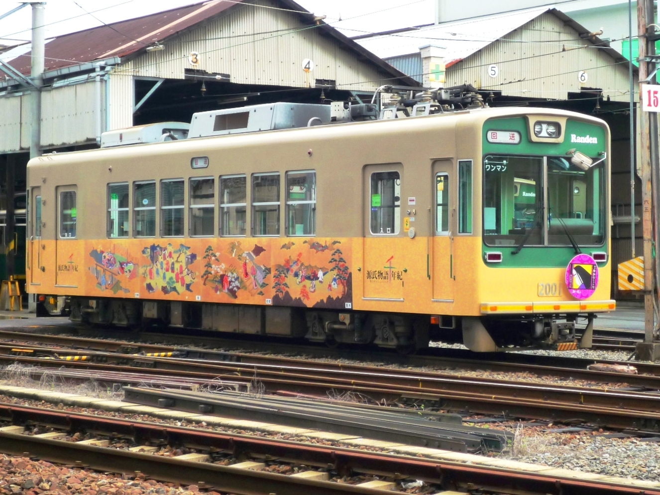 京福電気鉄道モボ2001形電車2001号車「紫のゆかりちゃん号」。台車は新製の住友FS94を使用している。西院駅のすぐ北にある西院車庫に留置中の姿。2009年12月4日に投稿者が撮影。 なお、このラッピングでの運用は同月末までであった。